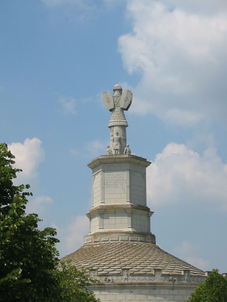 TropeumTraiani in Adamclisi